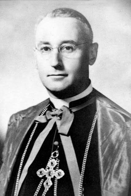 Domenico Enrici